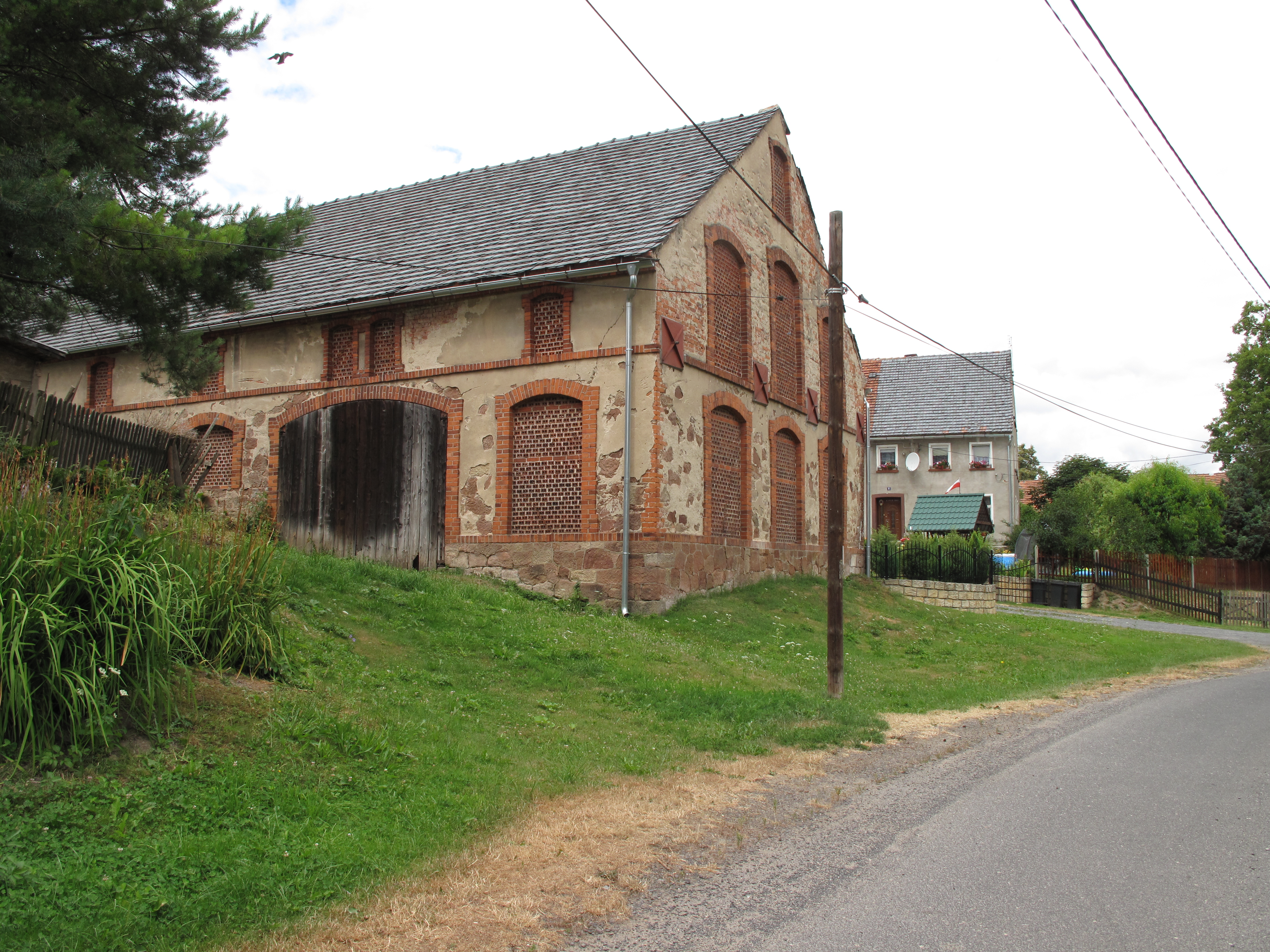 Biegoszów. Polska.